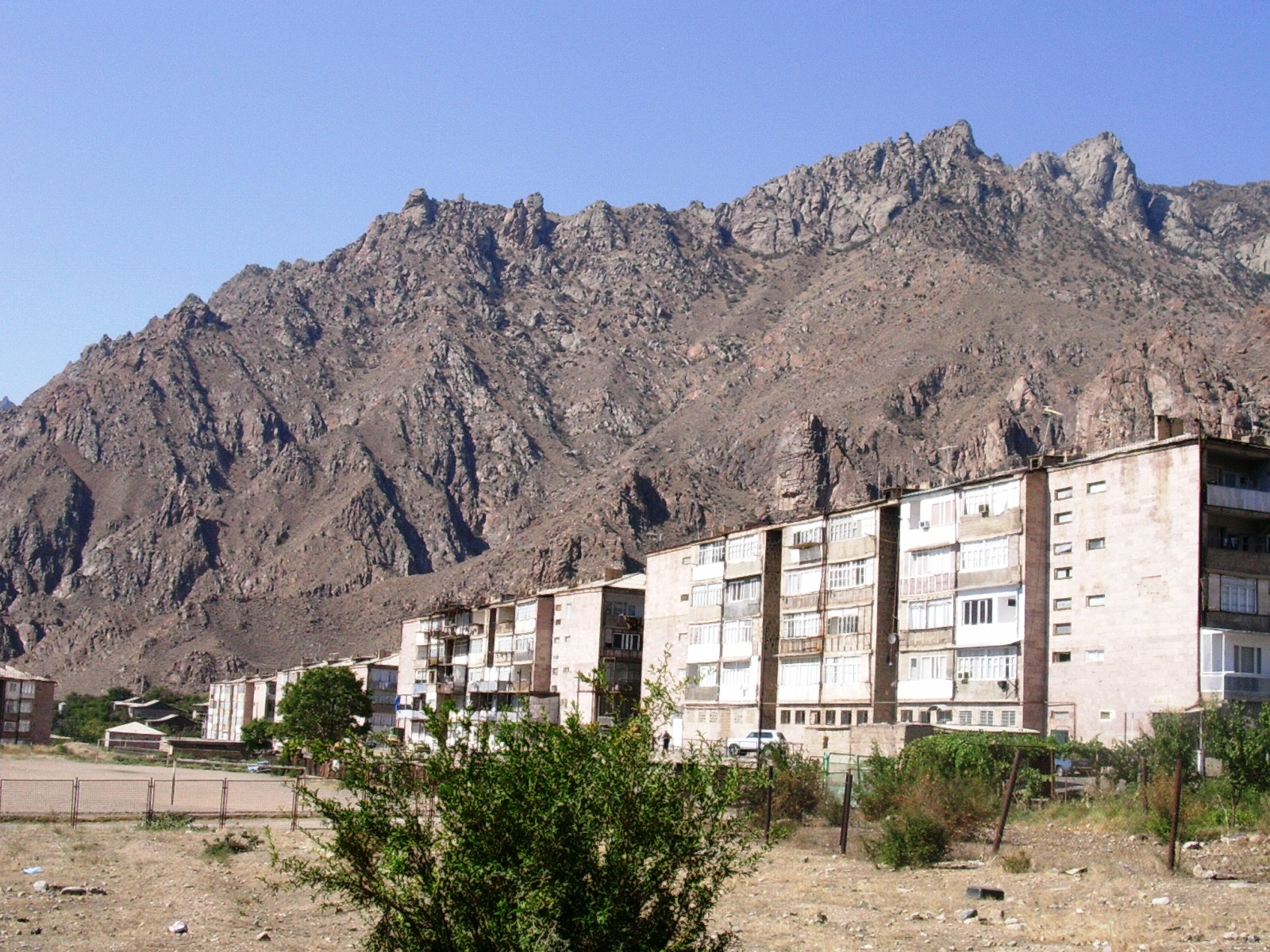 Agarak, Meghri Municipality, Syunik Province, Armenia.